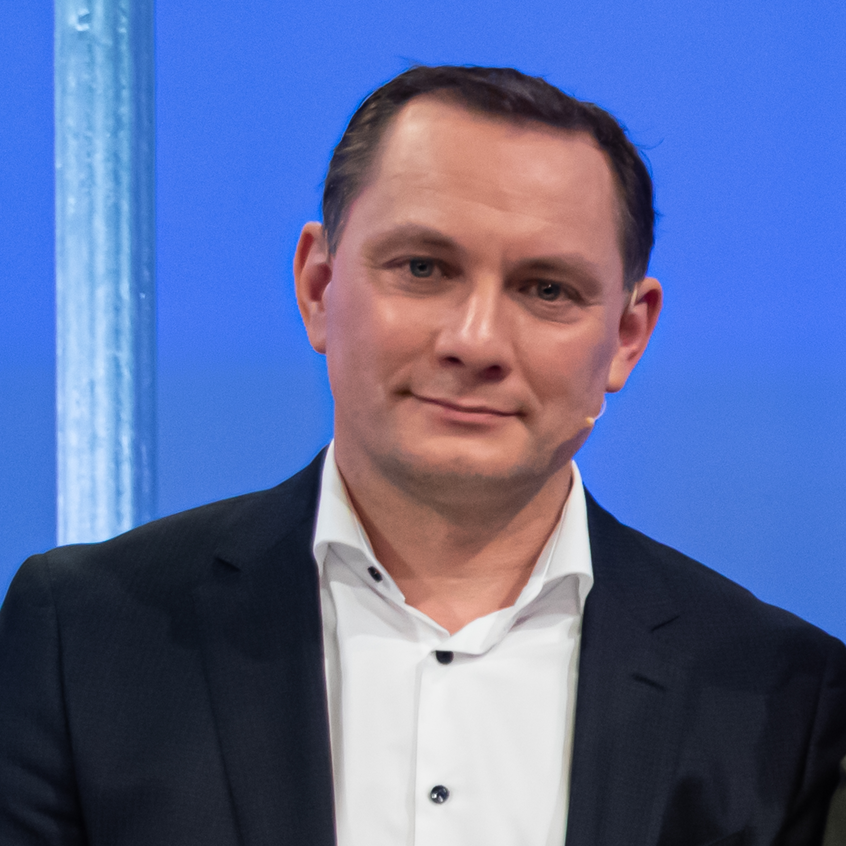 Politik, TV, Maischberger vor Ort, Sendung vom 11.03.2020; Tino Chrupalla, Bundesvorsitzender der AfD